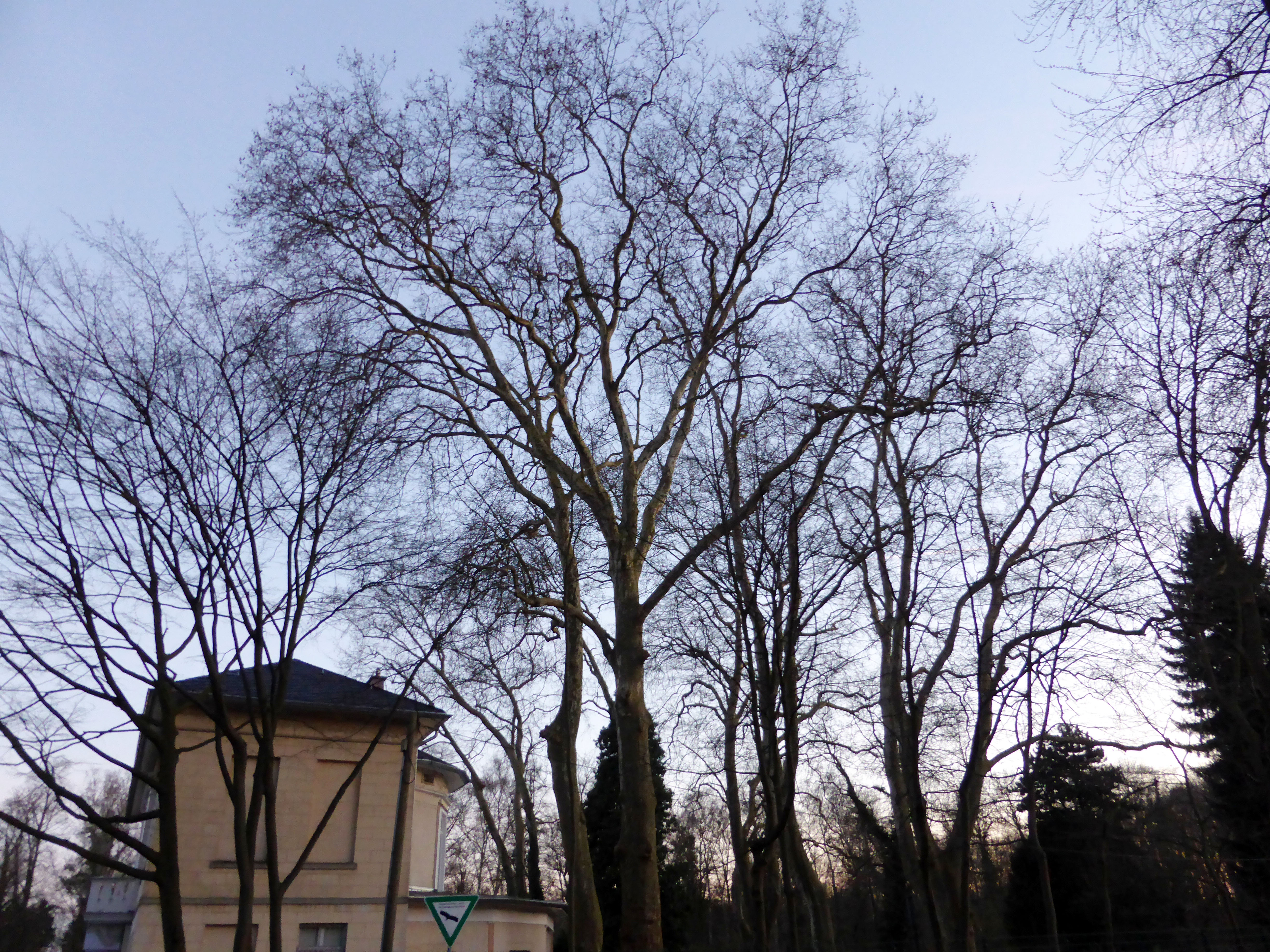 Bahnhof Belvedere: Naturdenkmal-Nr. 305.01 Platanengruppe (Ahornblättrige Platane Platanus × acerifolia) This is a photograph of an architectural monument.